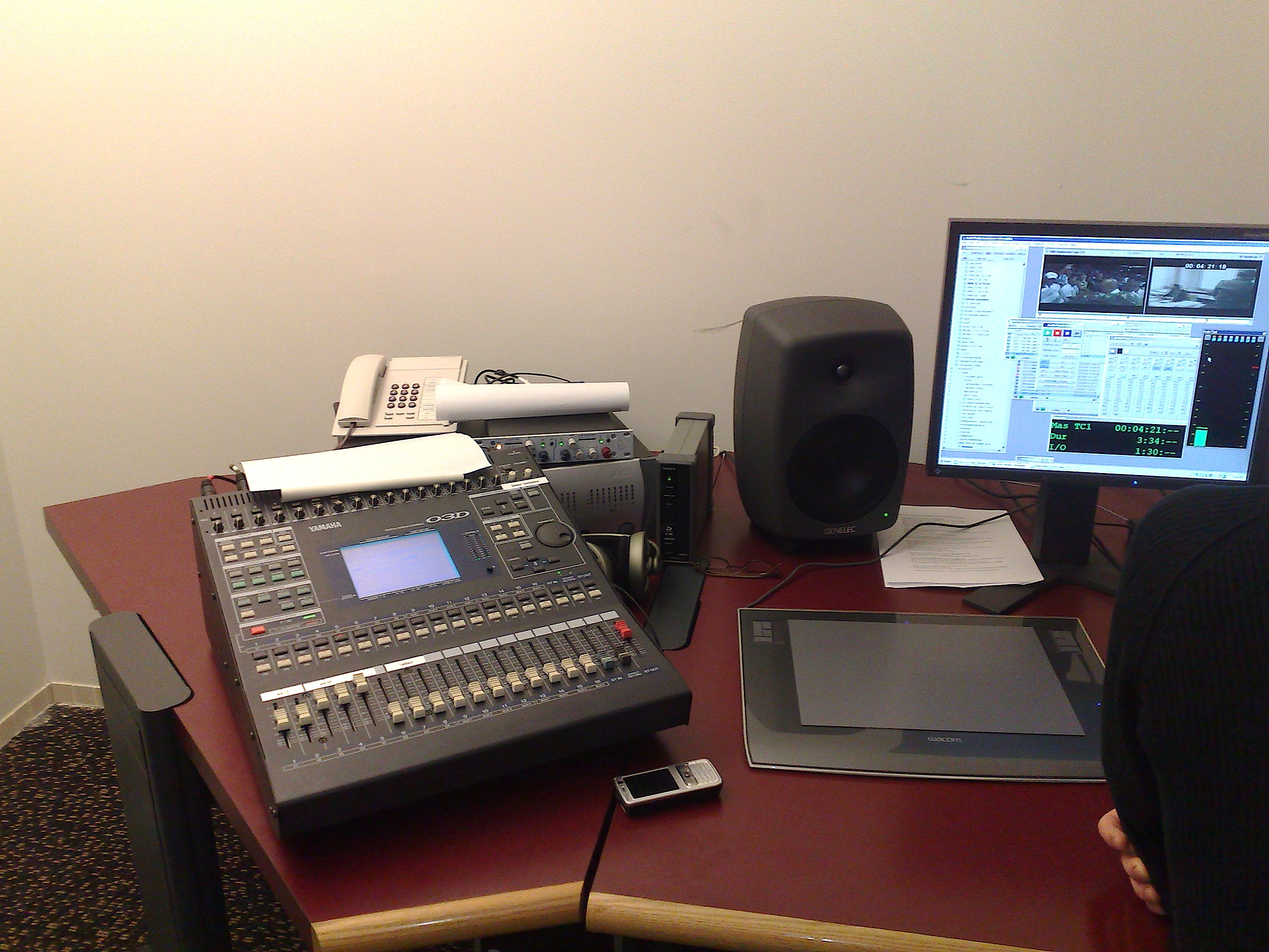 For voice over work